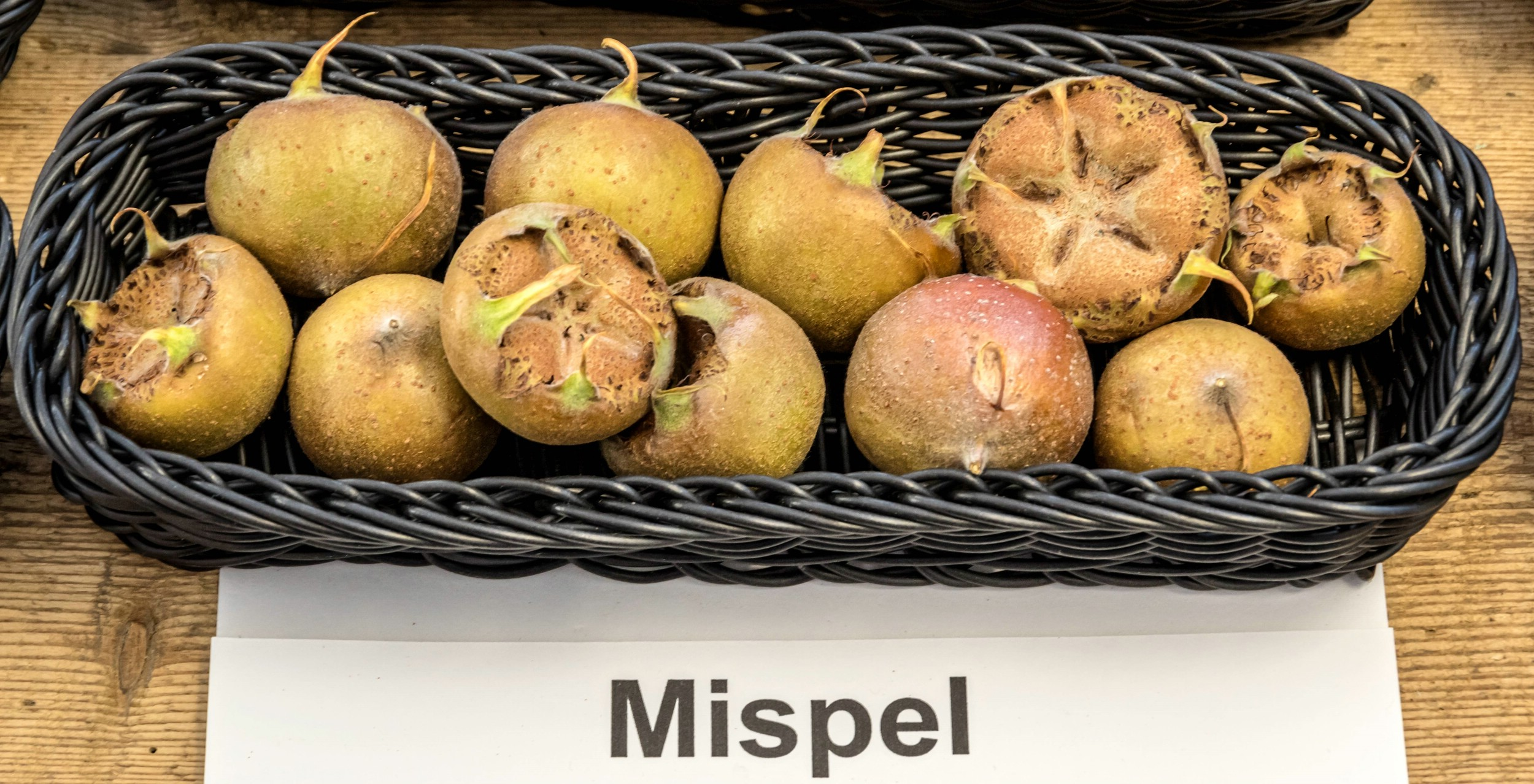 Mispel (Mespilus germanica), von denen es im Badischen noch tragende Bäume gibt. Alle Aufnahmen au dem Oktober 2015